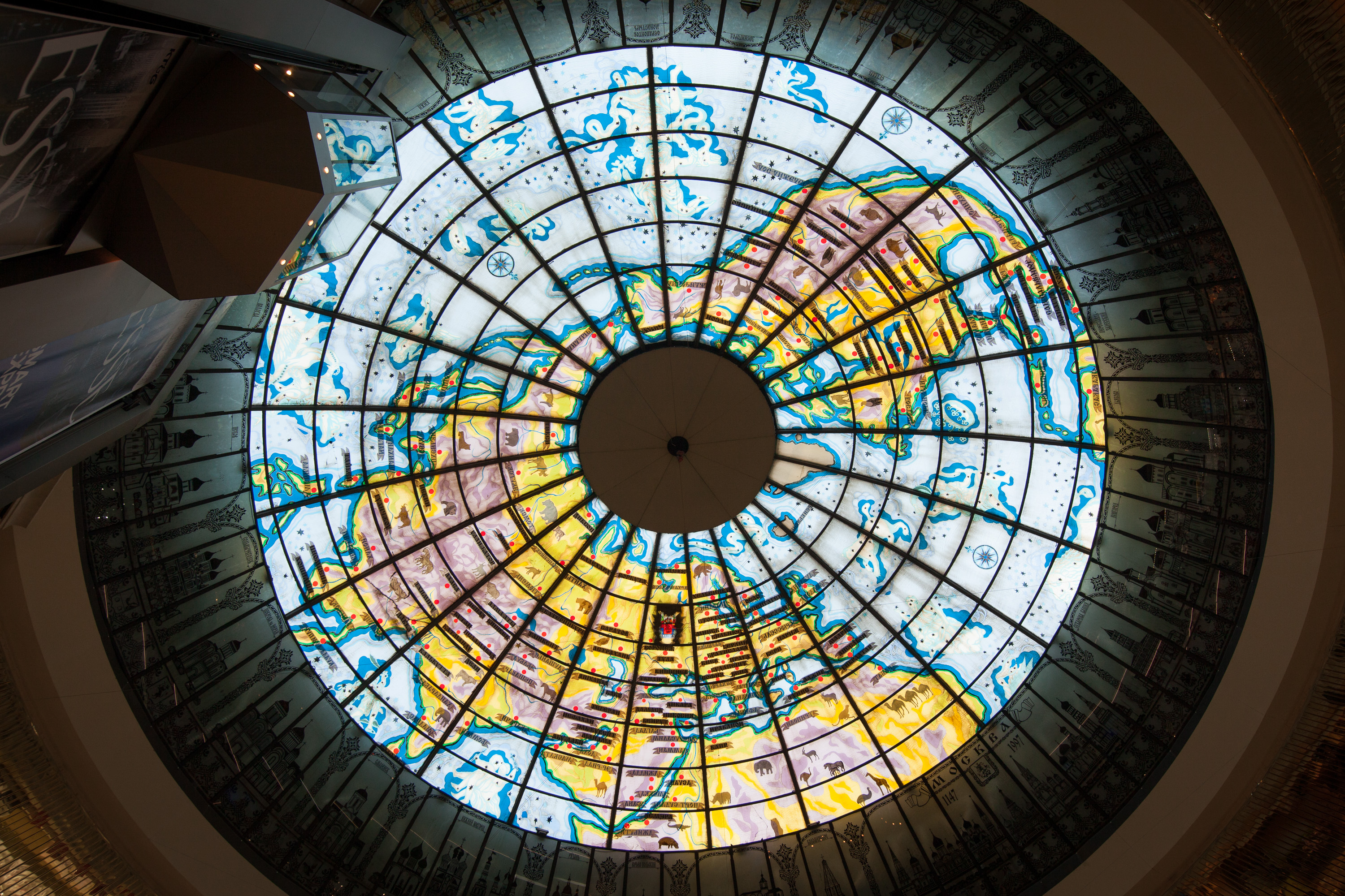 Moscow